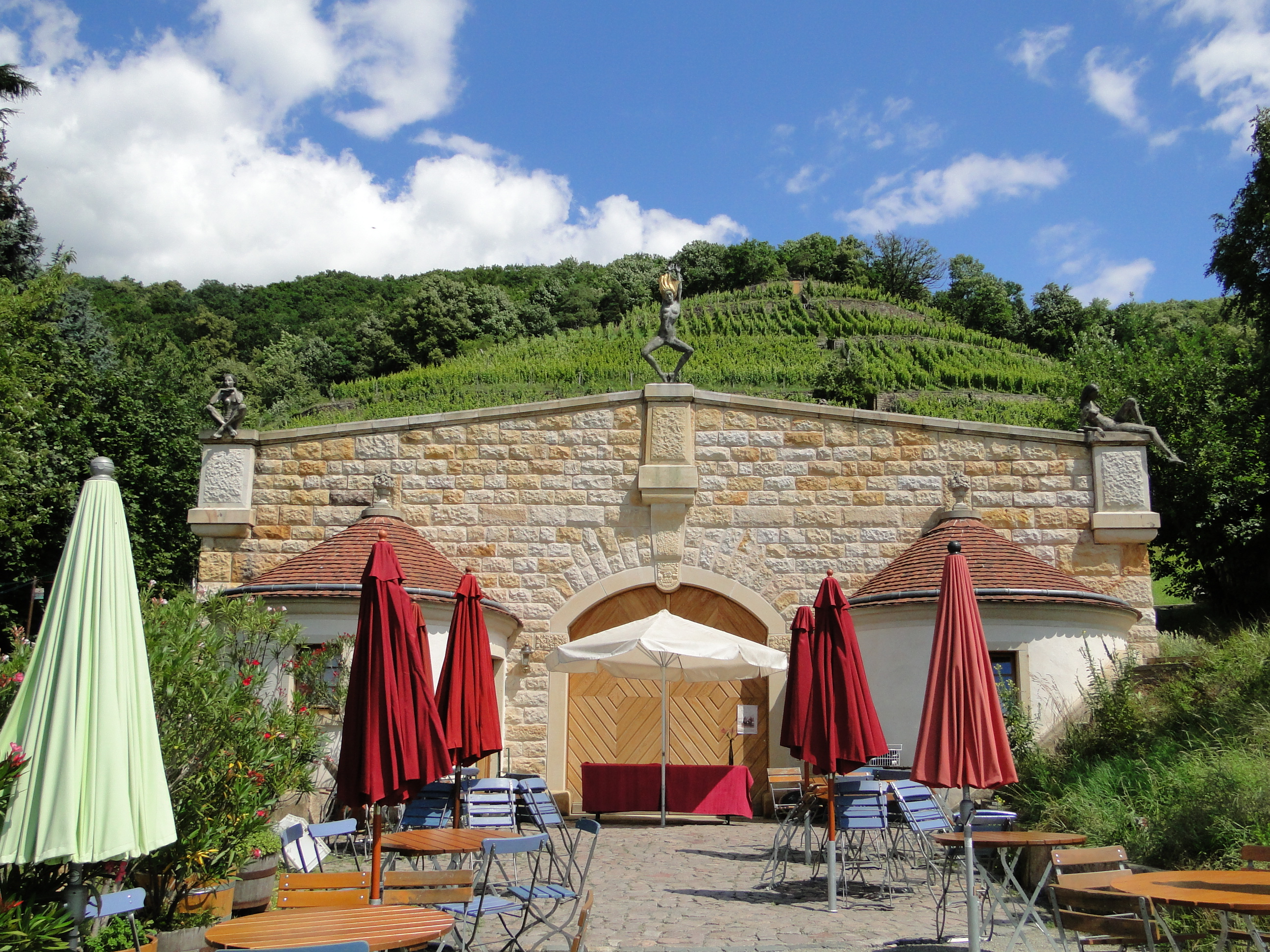 Bergweg 27 Dresden-Pillnitz, Weingut Zimmerling, mit drei Skulpturen von Malgorzata Chodakowska